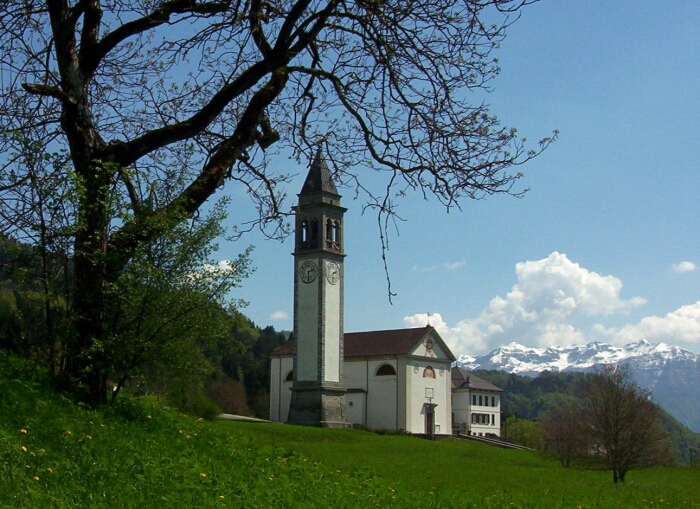 Chiesa della Santissima Trinità ad Ovaro, Carnia.